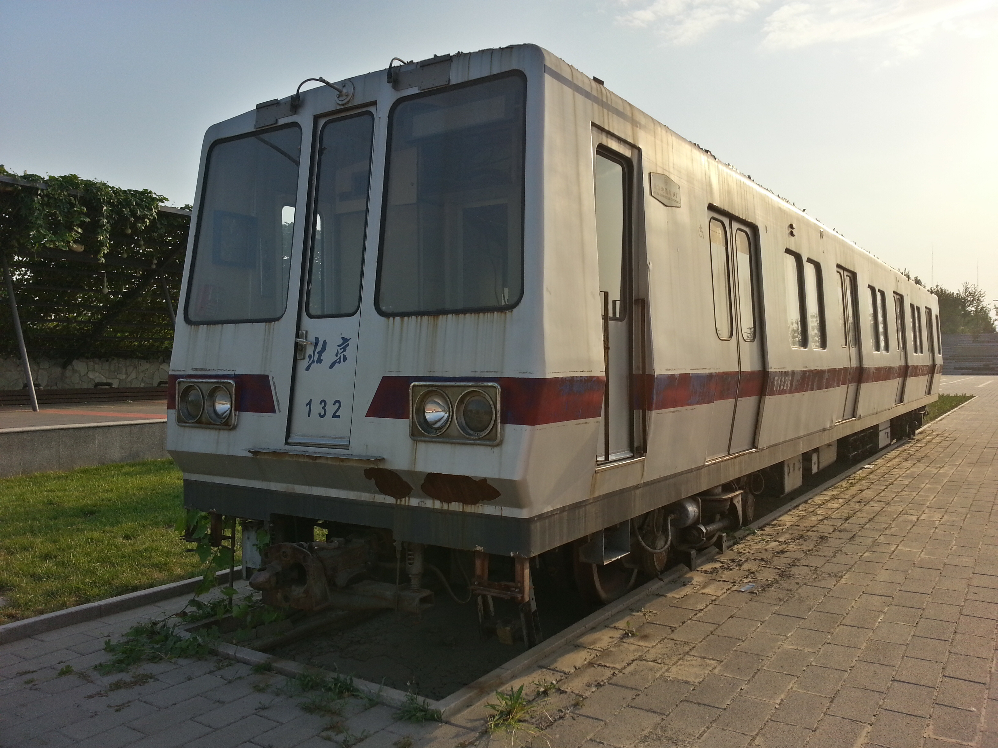 北京地铁文化公园中的T1326